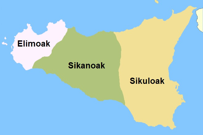 Siziliako tribuak K.a. XI. mendean